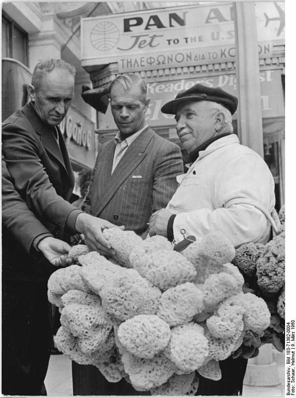 Zentralbild Schaar-9.3.1960 FDGB-Urlauberschiff "Völkerfreundschaft" in Constante. Nach dreizehntägiger Fahrt ist das erste FDGB-Urlauberschiff der DDR, die "Völkerfreundschaft", am Vormittag des 7. März 1960 in dem rumänischen Schwarzmeerhafen Constanta vor Anker gegangen. amit hat der moderne Hochsee-Passagierdampfer, der aus Mitteln der Steckenpferdbewegung aus Schwedenangekauft war, seine erste Reise erfolgreich beendet. UBz: Walter Zimmermann von der PGH Schmuck- und Metallwaren in Quedlinburg und Walter Buchda, Vulkaniseur im Reifenwerk Riesa, beim Schwammkauf in den Strassen Athens.